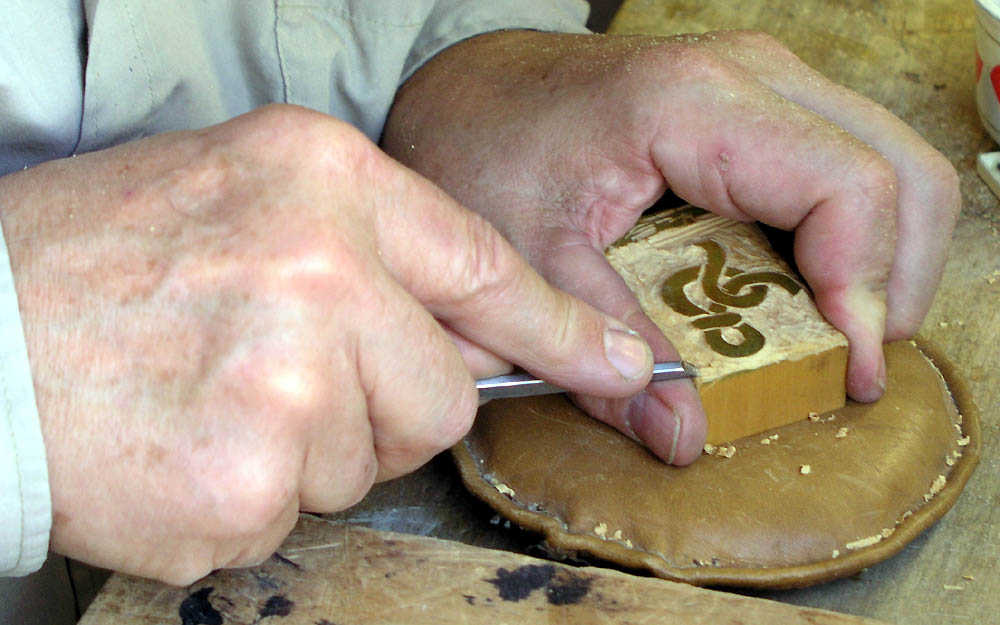 Réalisation d'un cliché par gravure sur bois en taille d'épargne sur un bloc de bois franc.